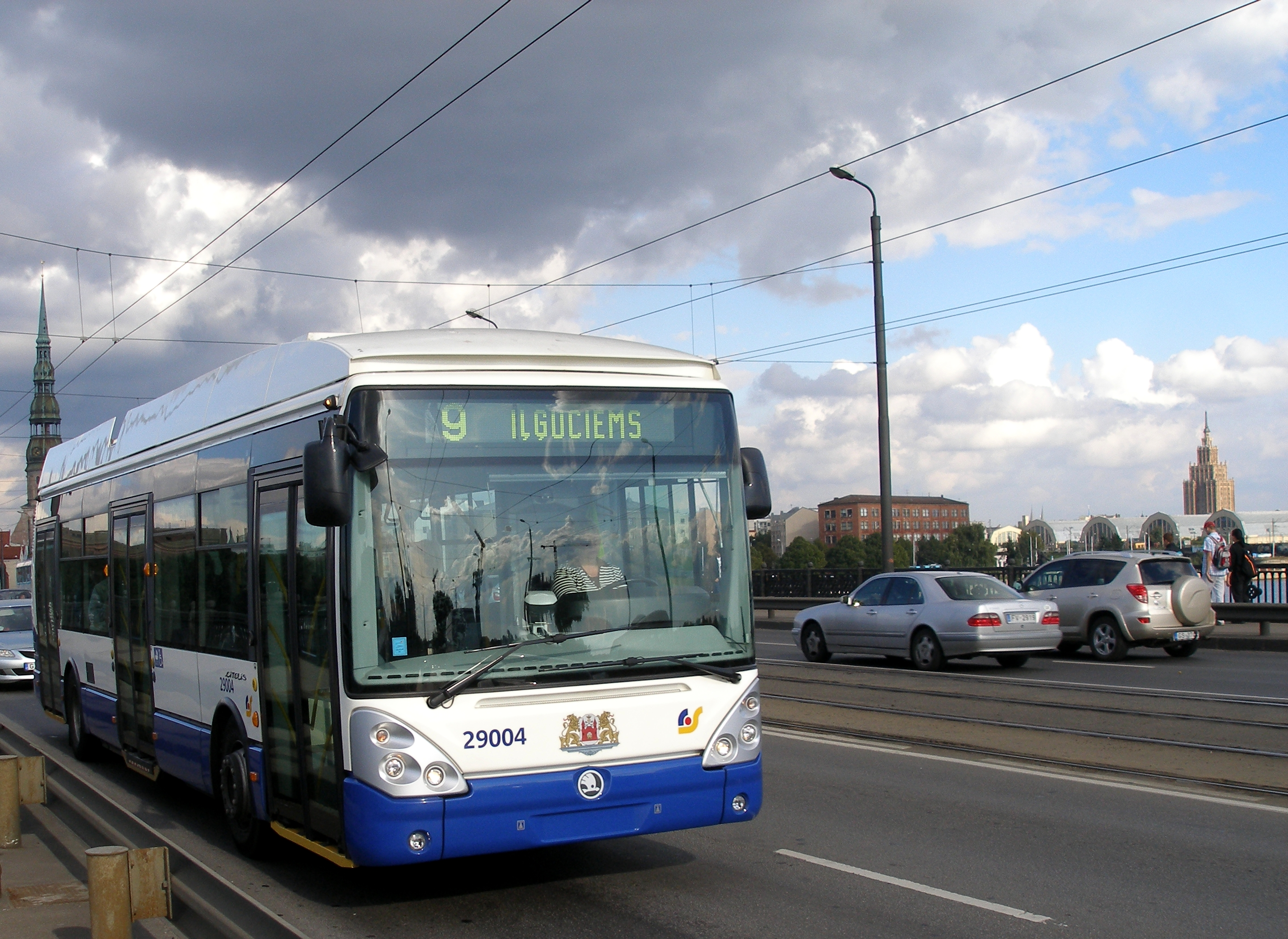 9. maršruta trolejbuss Škoda Irisbus 24Tr uz Akmens tilta (brauc, izmantojot dīzeļģeneratoru).